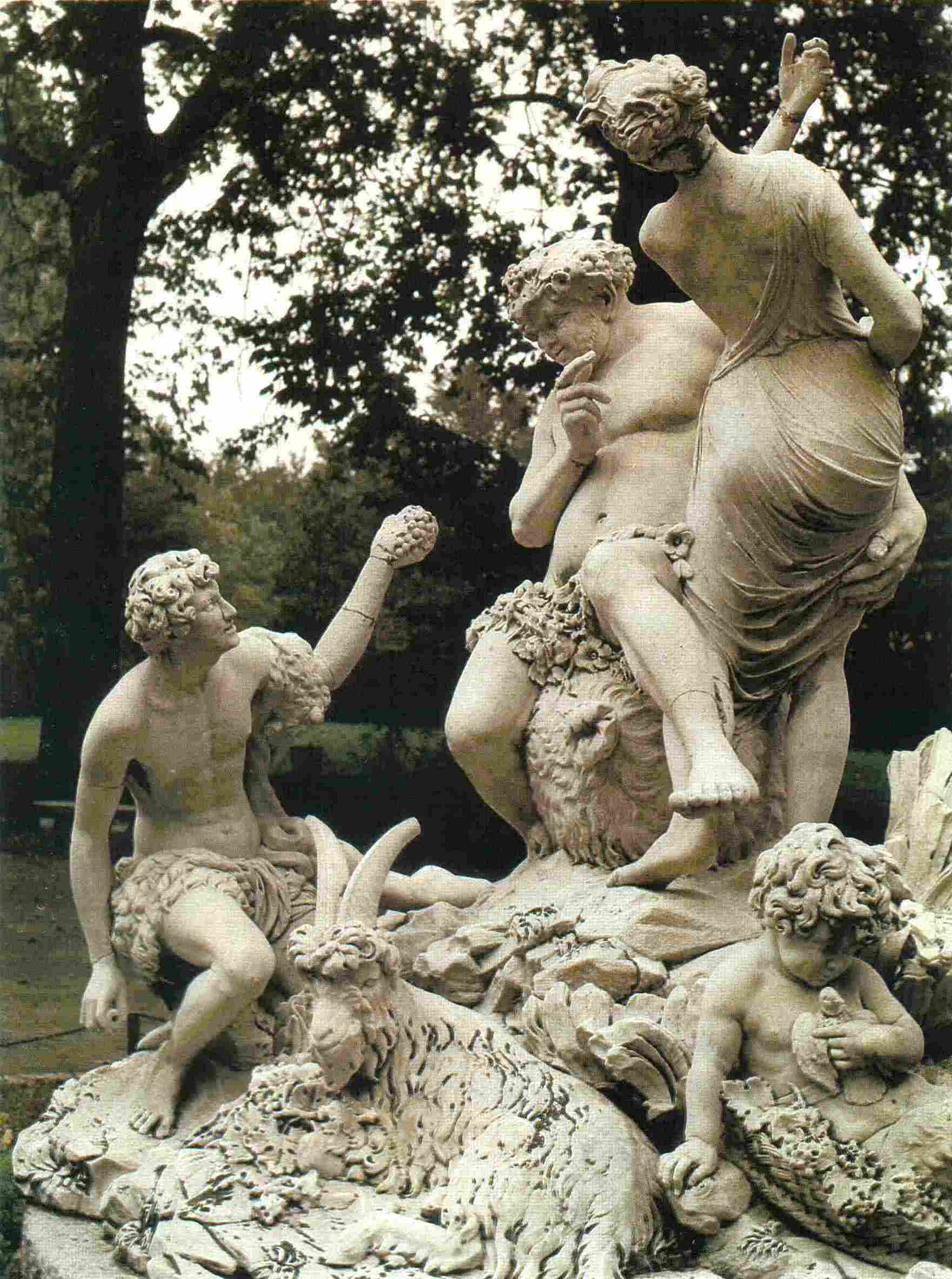 Gruppo del Sileno (particolare), scultura in marmo di Carrara di Jean-Baptiste Boudard, nel Parco Ducale di Parma.